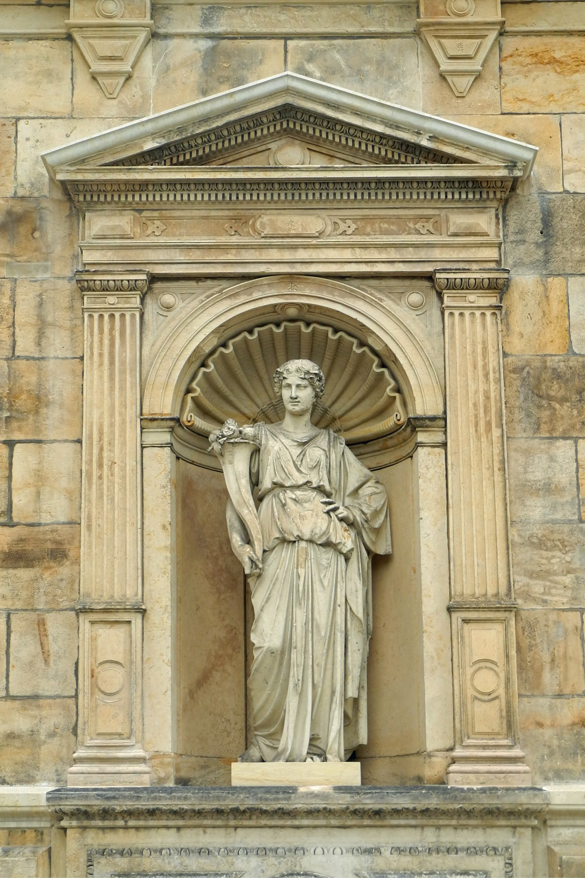 Zwei Skulpturen von Ernst Hähnel an der Stirnseite der Orangerie in Der Herzogin Garten; hier Pomona mit dem Füllhorn.